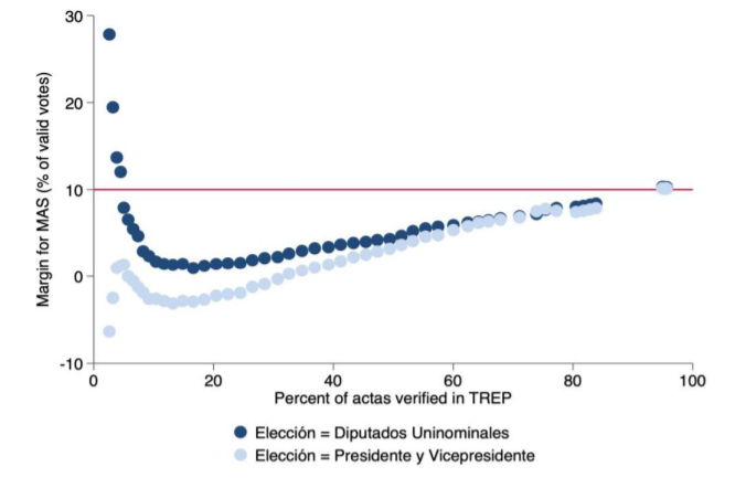 El margen del MAS aumentó constantemente durante la mayor parte del conteo rápido TREP a medida que se verificaban más actas.